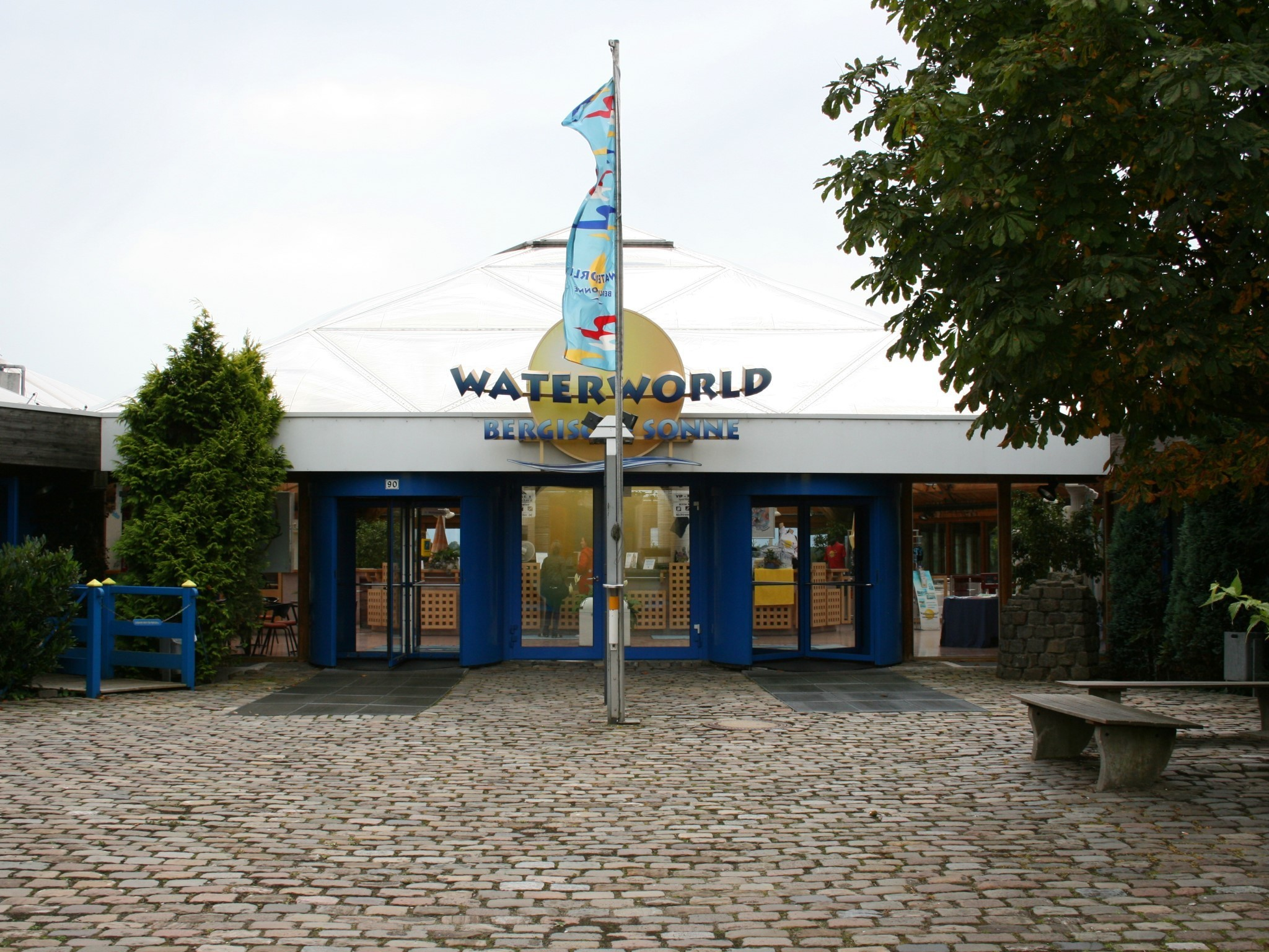 "Bergische Sonne" - Spaßbad mit Sauna und Gastronomie in Wuppertal